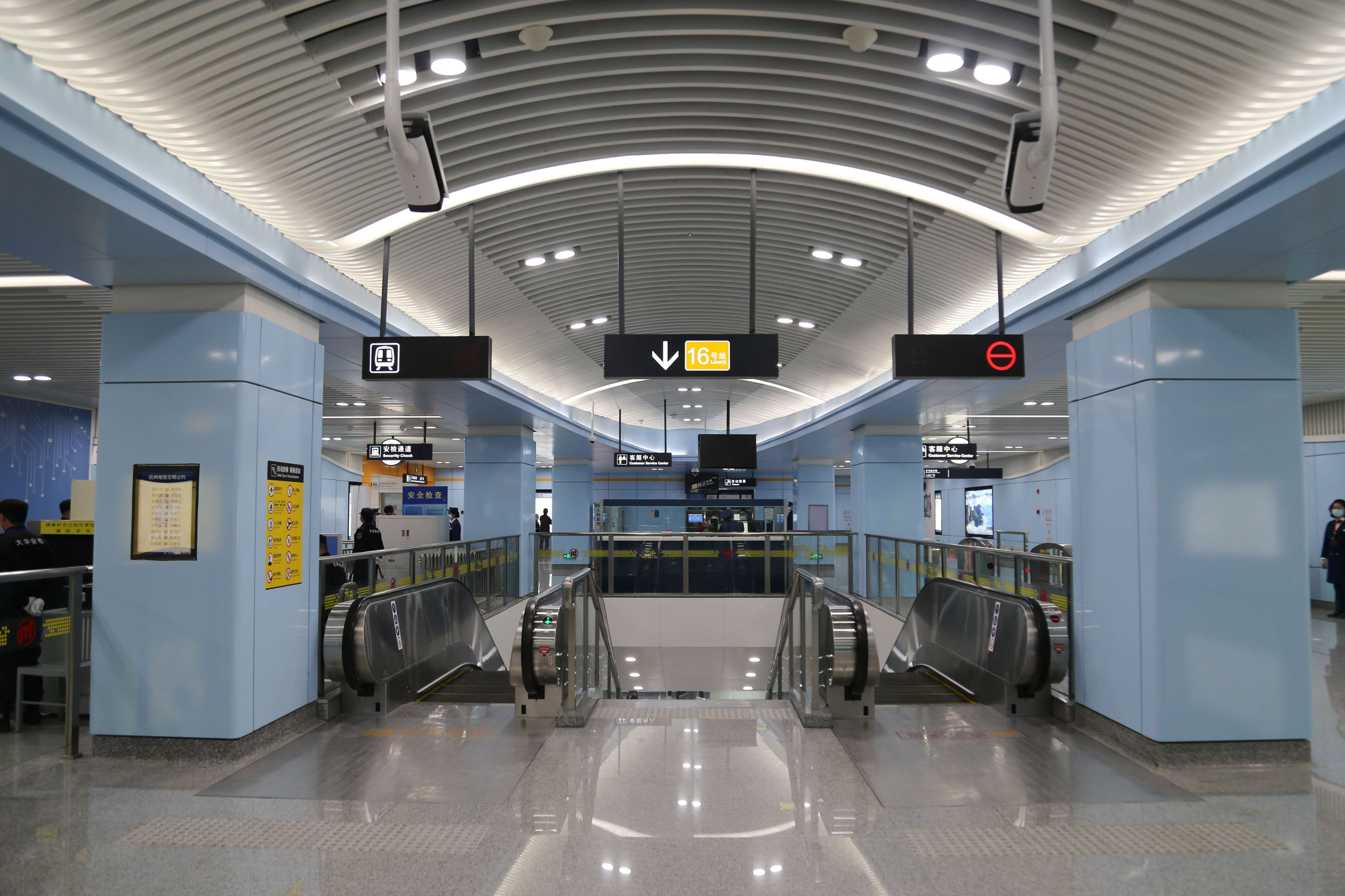 临安广场站站厅